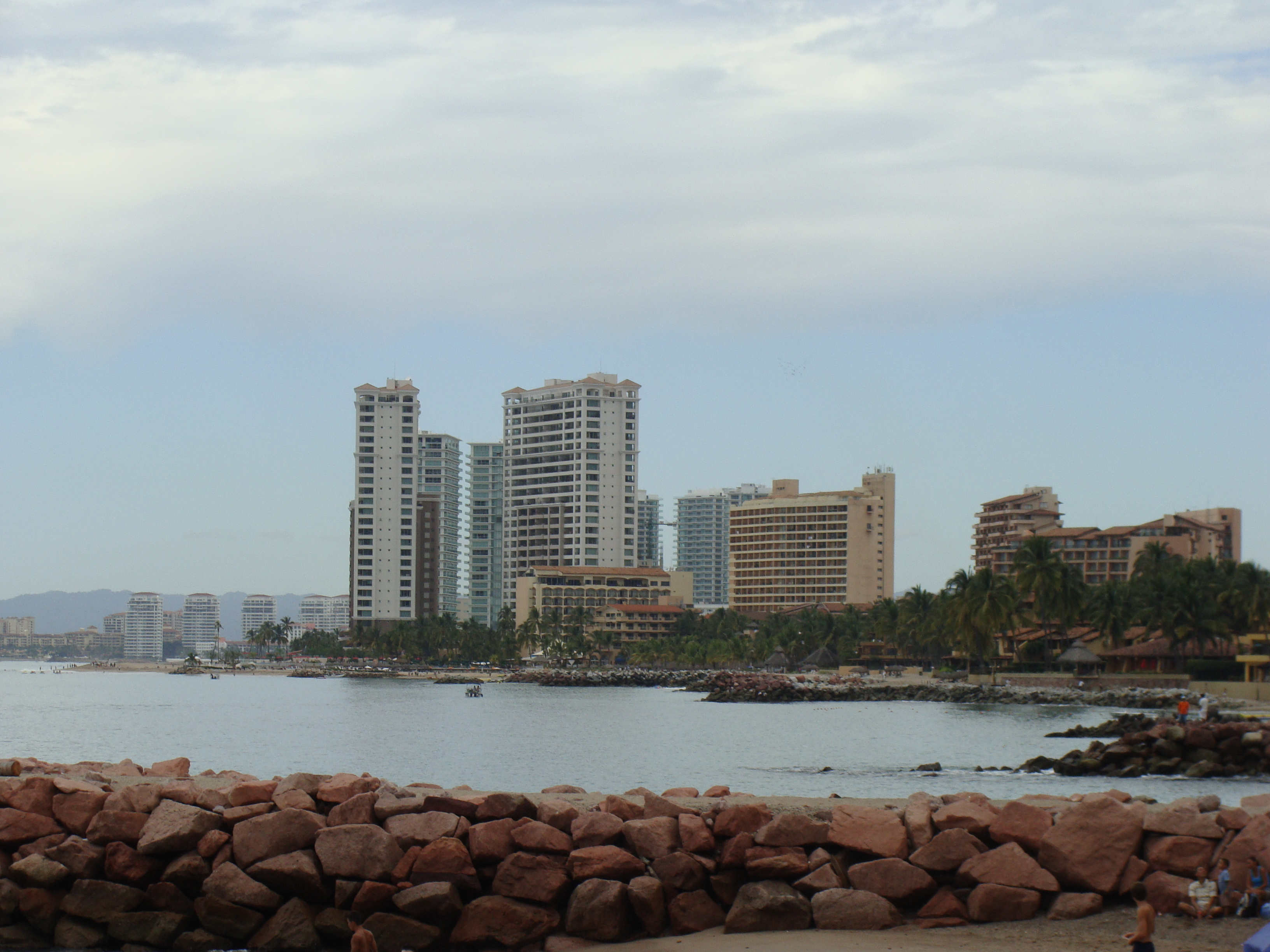 Puerto Vallarta, au Mexique. Édifices.